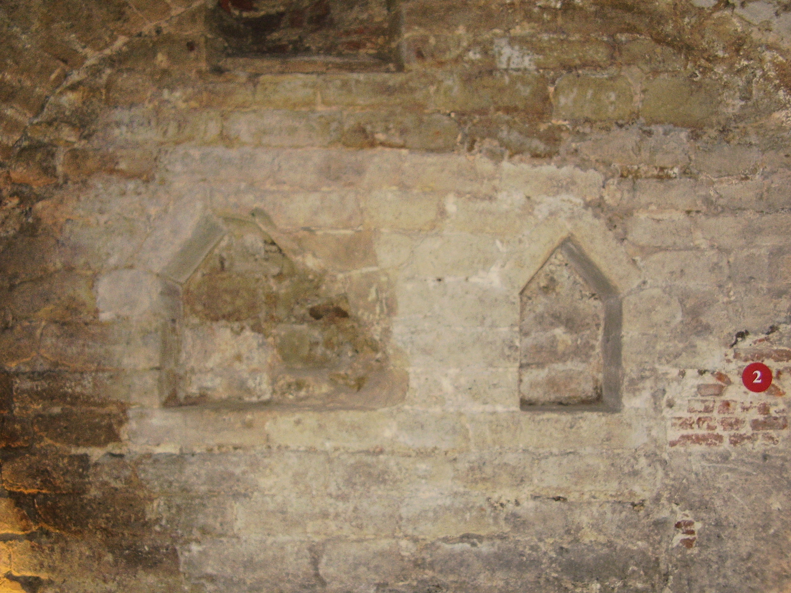 Description: Ancien Palais du Coudenberg (Bruxelles) - partie la plus ancienne, fondation du XIIe siècle Author: User:Ben2 Date of creation: 12 juin 2006 Source: Photo personnelle